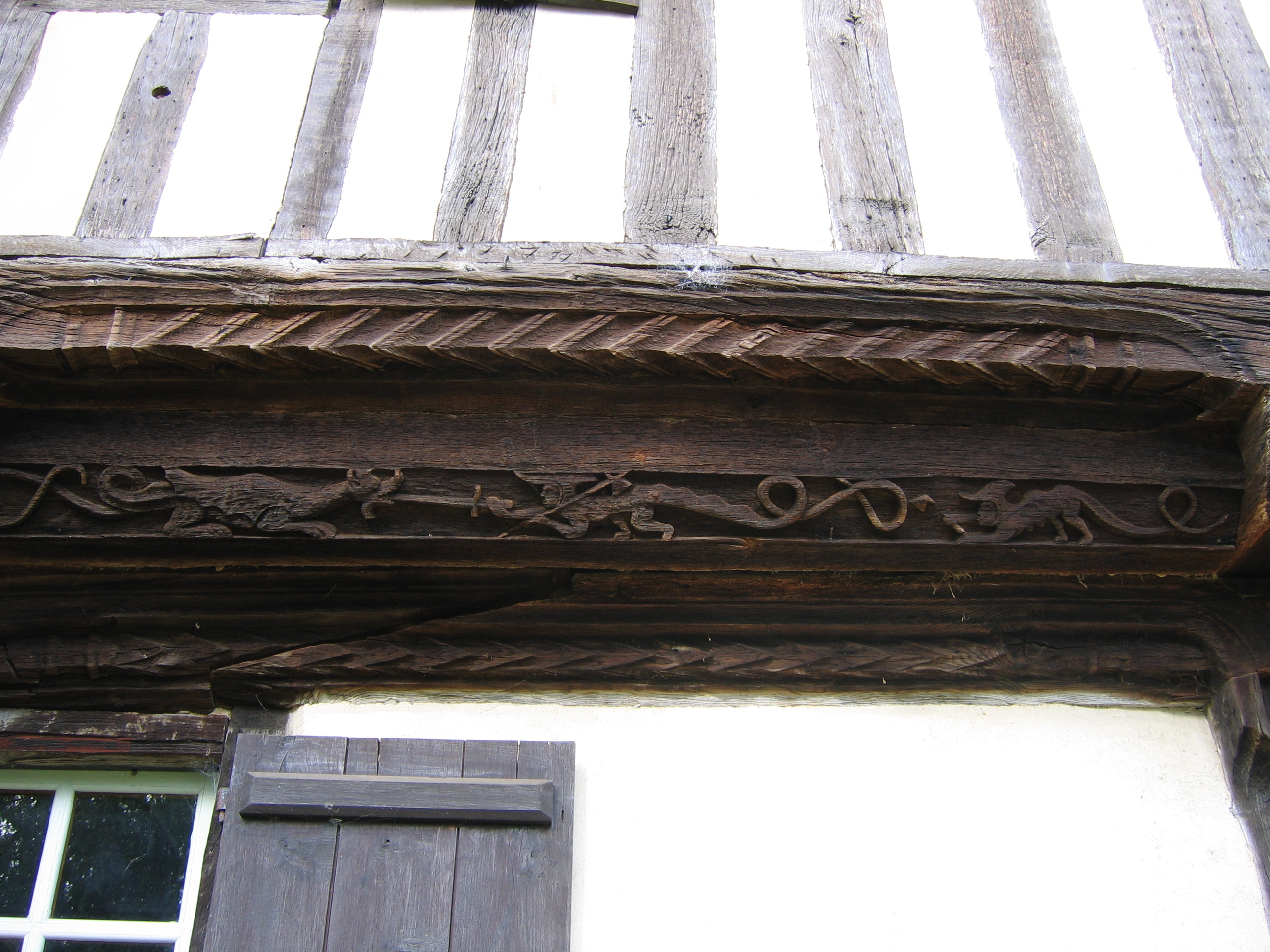 Scène des dragons-encorbellement du Prieuré de Saint-Arnoult